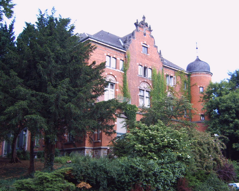 Elisabeth-Anna-Palais in Oldenburg.